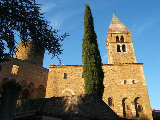 Château et chapelle de Chatillon, dans le Beaujolais (France)